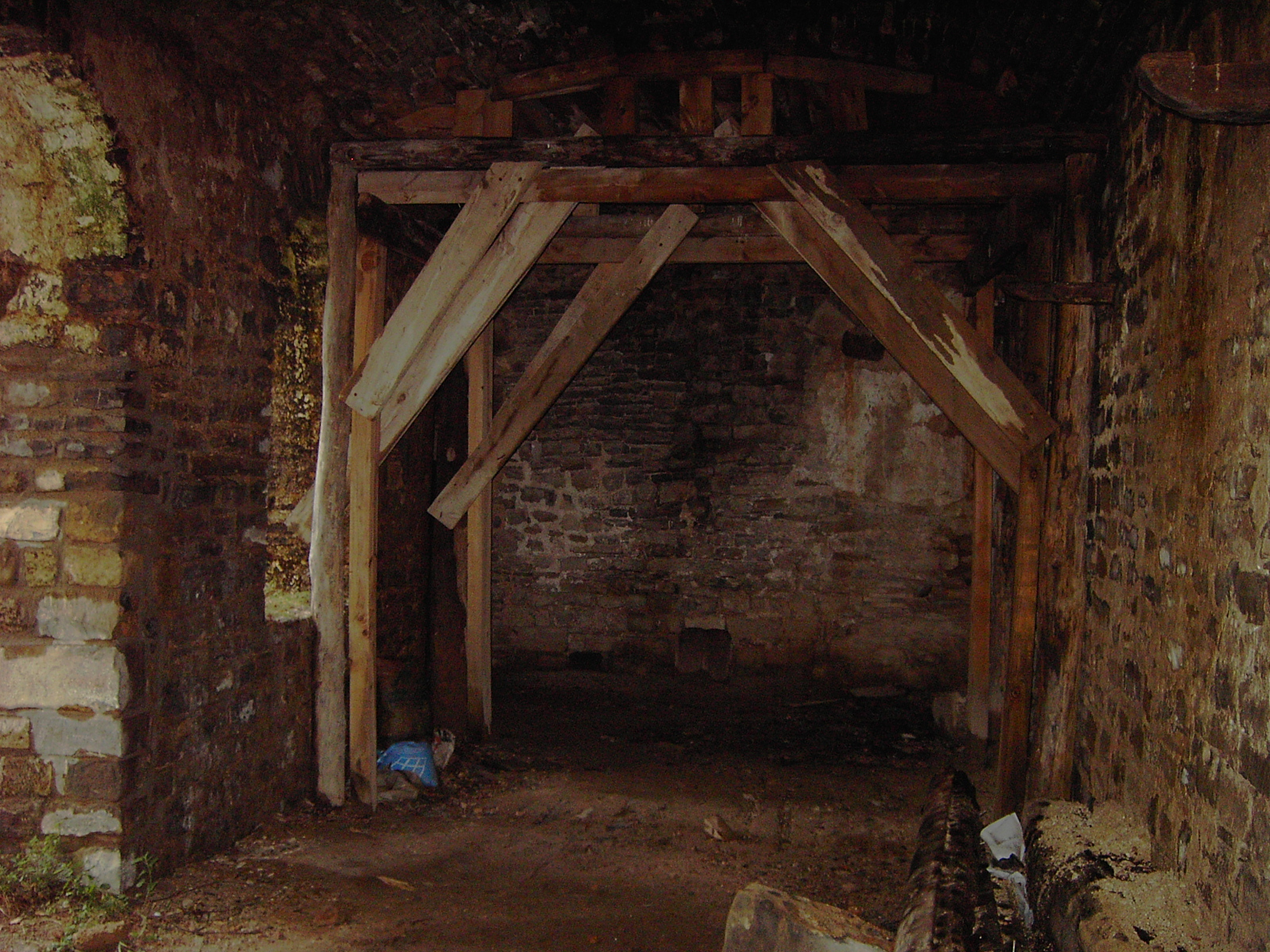 Deambulatorio del claustro de San Victorián, apuntalada de lastimosa manera en espera de una restauración.